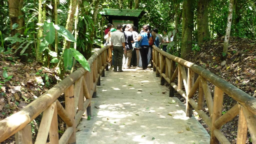 Senderos con facilidaes de interpretación arqueológica y de biodiversidad en el Monumento Nacional Guayabo, Costa Rica